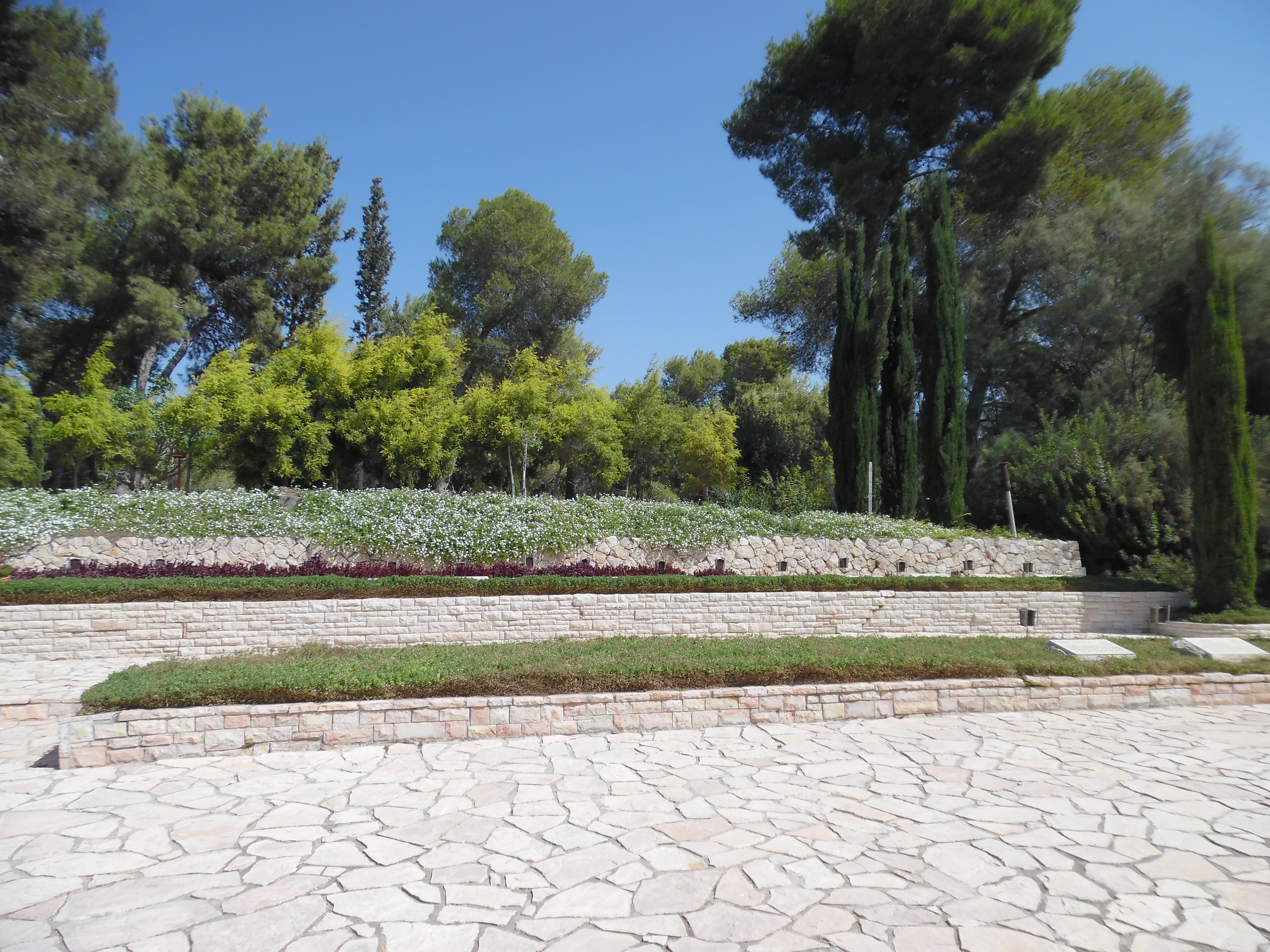 גבעה על יד קיבוץ יד מרדכי שבה מוצג שיחזור מדויק של הקרב המכריע שהתרחש במקום במלחמת העצמאות מול הצבא המצרי